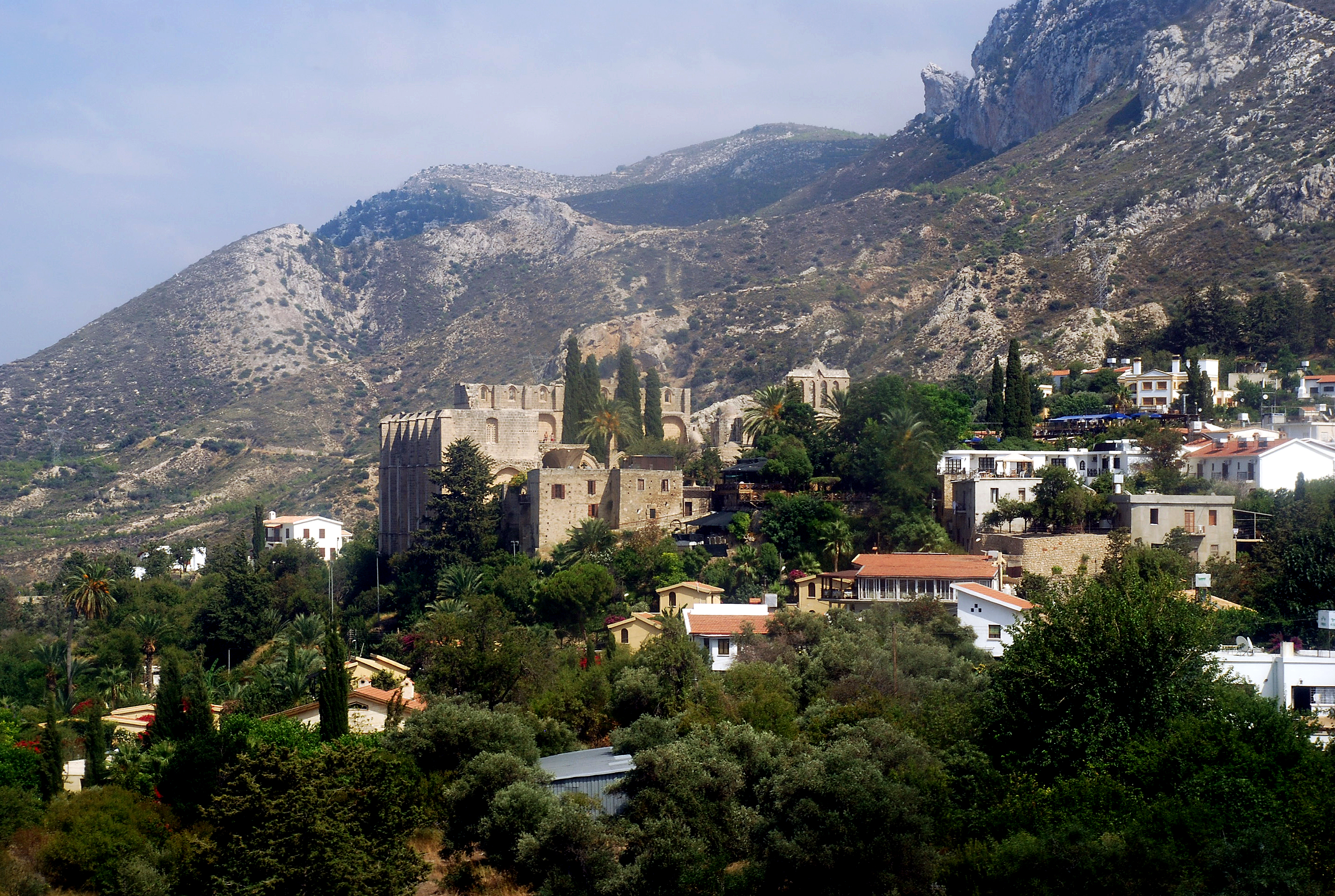 Bellapais, Girne, Nordzypern: Lage der Klostergebäude am Nordhang des Pentadaktylosgebirges (Beşparmak-Gebirge)